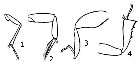 Жесткокрылые. Типы строения ног. (По Якобсону и Жаннелю). 1 -бегательная нога. 2 - плавательная, 3 - прыгательная нога, 4 - копательная нога.